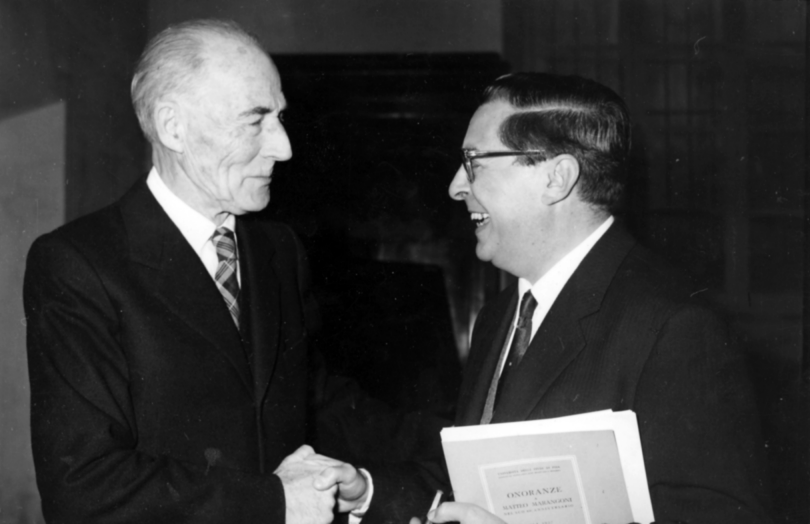 Matteo Marangoni (1876-1958) (sx) con C. L. Ragghianti (1910-1987)